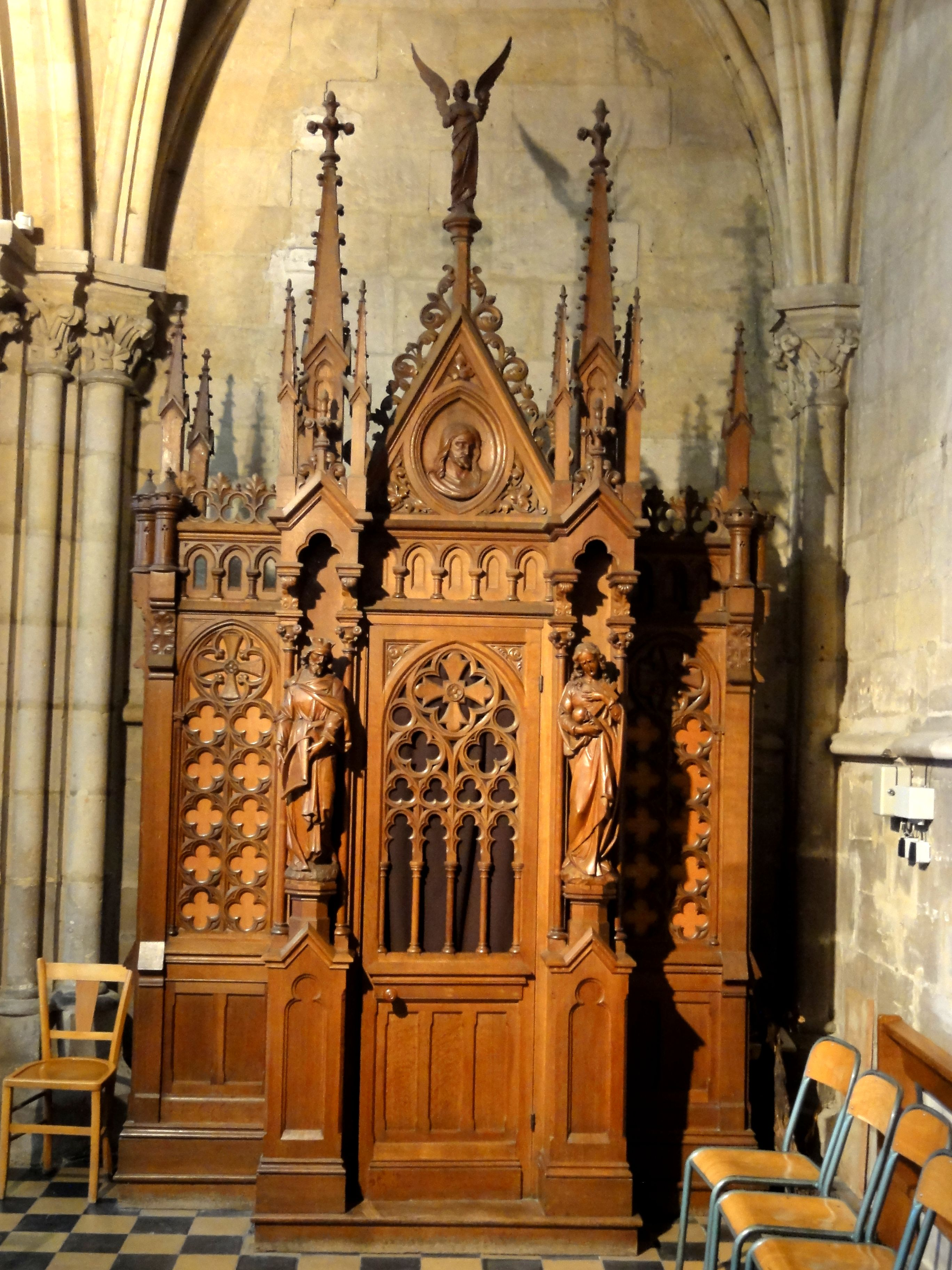 Confessional de 1852 (IMH).